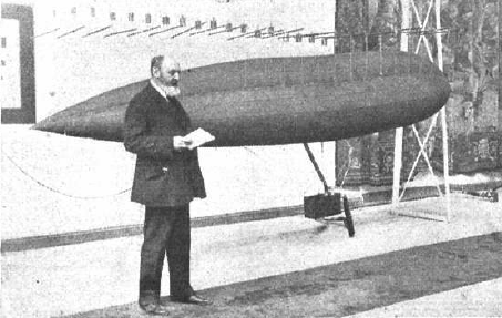 Fotografía del ingeniero español Leonardo Torres Quevedo junto a un modelo del dirigible de su invención publicada en 1913